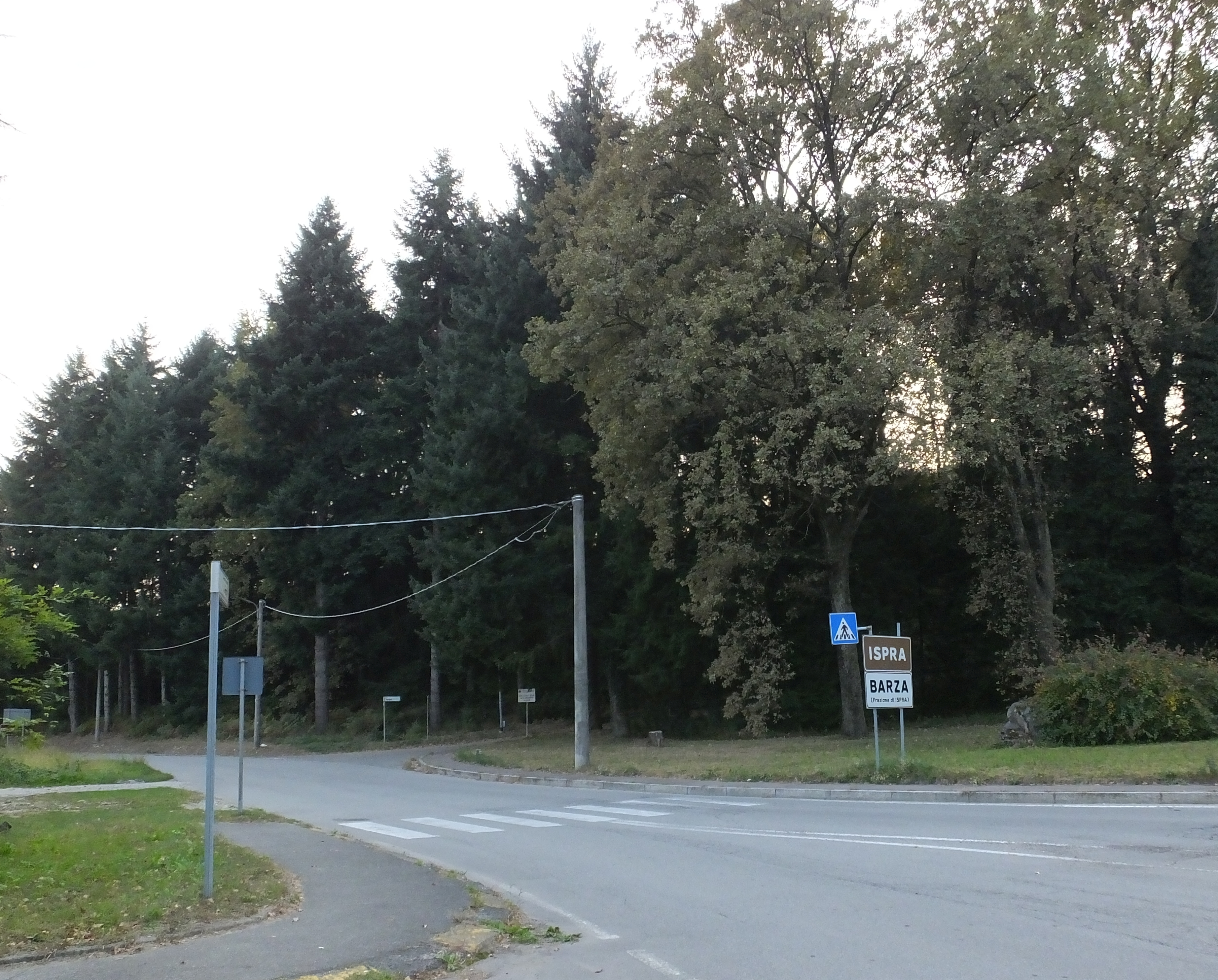 Rondo w Isprze przy granicy z Cadrezzate i Barzą